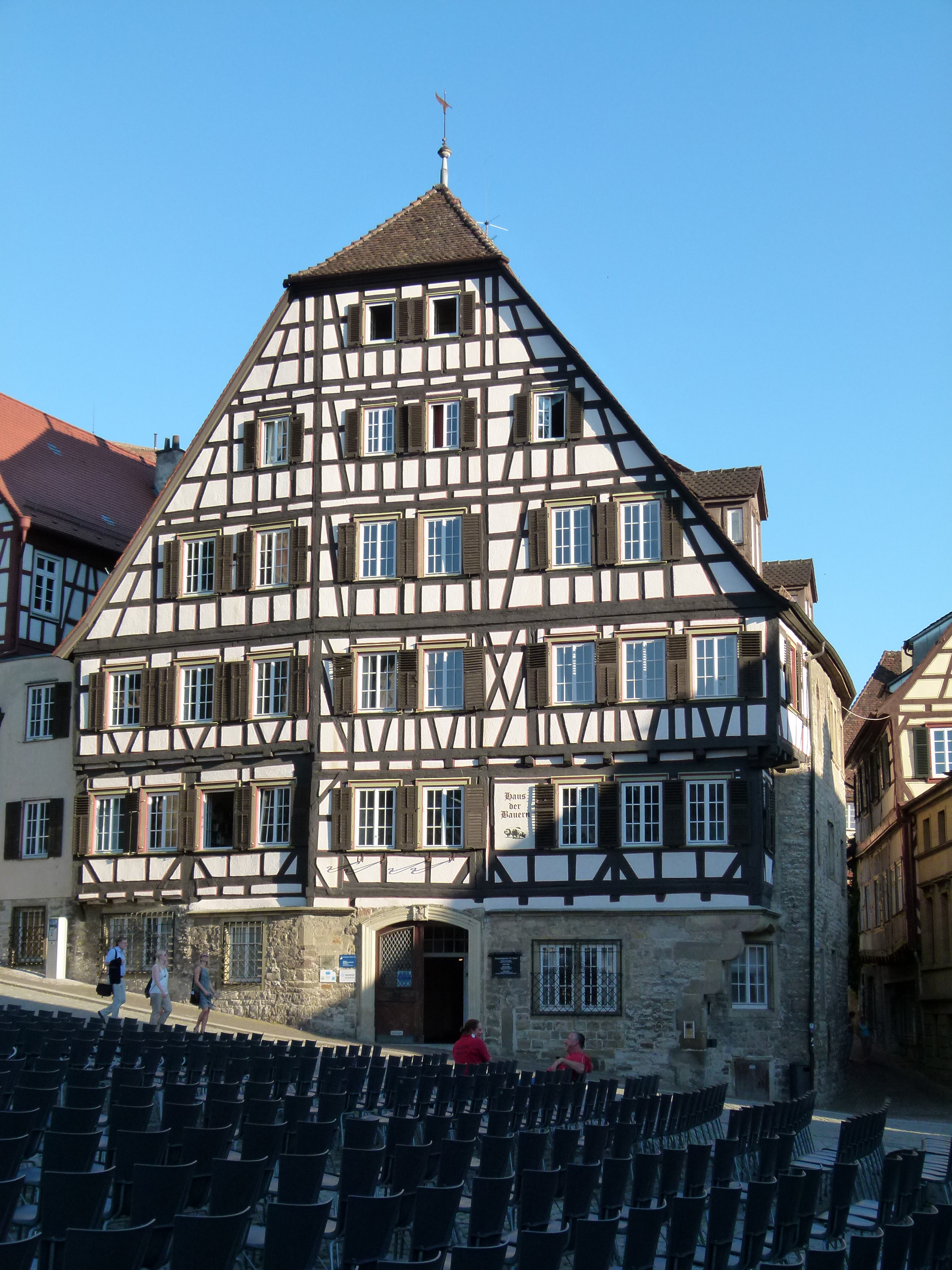 Denkmalgeschütztes Haus, Am Markt 2, Schwäbisch Hall